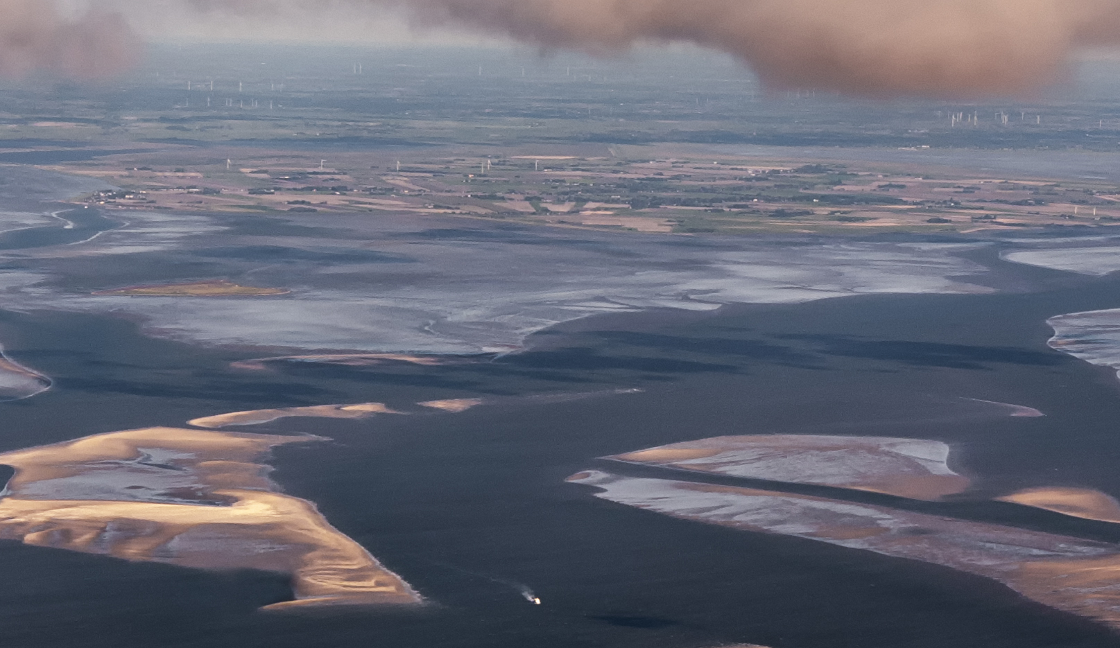 Fotoflug über das nordfriesische Wattenmeer, Blick aus W, 1 km Höhe auf Südfall und Nordstrand, genau in der Bildmitte Überreste von Rungholt